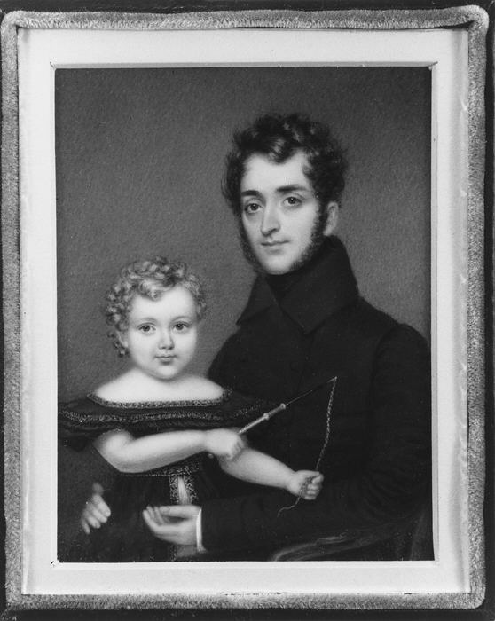 Painting, miniature; Paintings